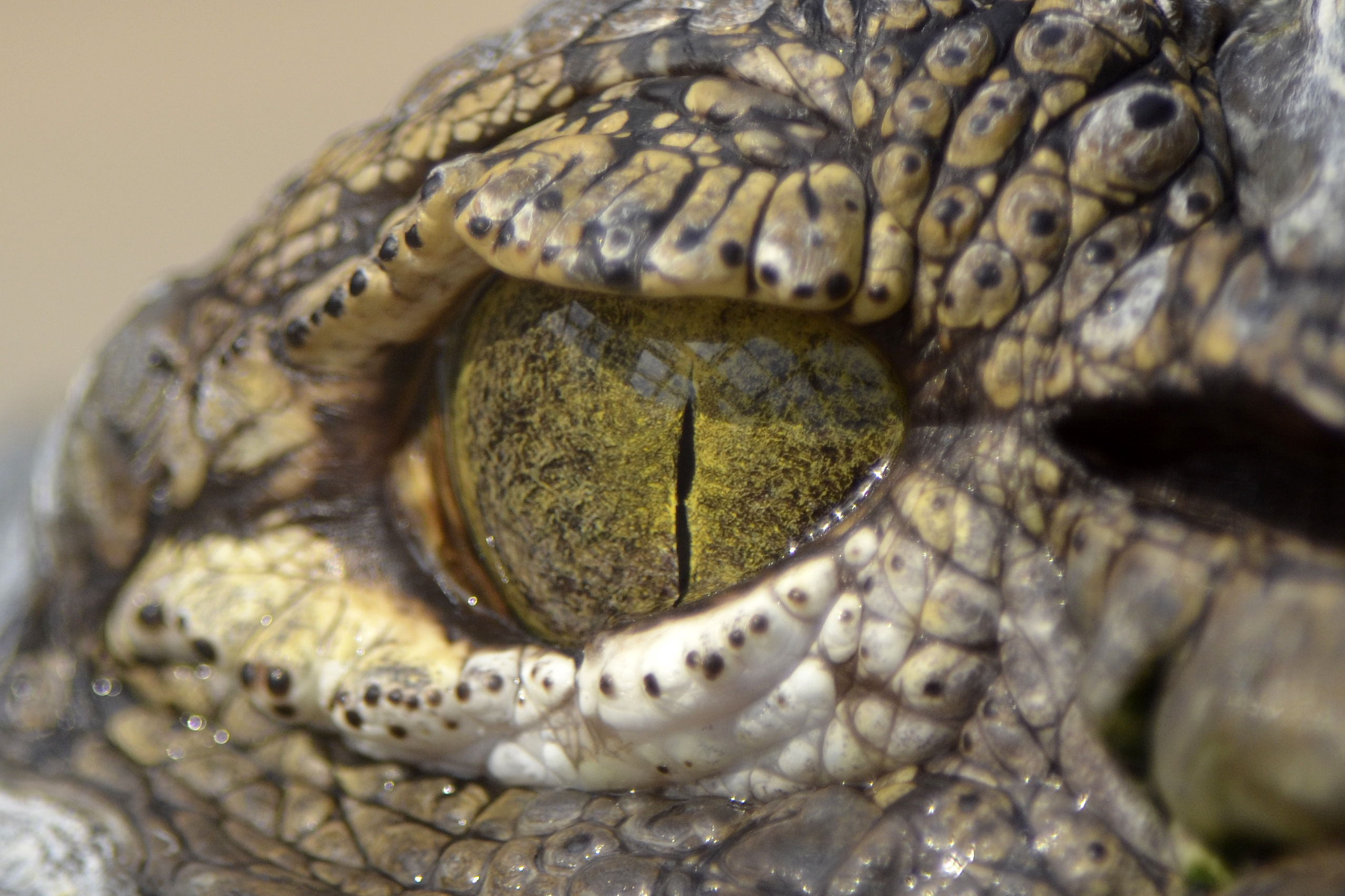 A crocodile's eye